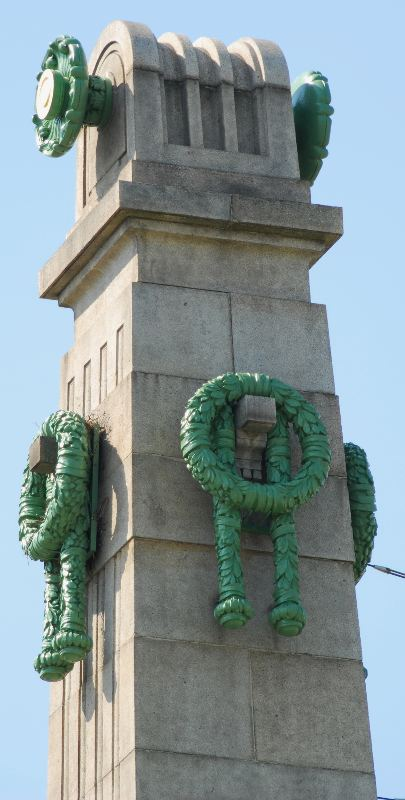 Die Brücke über die Zeile, auch genannt Brücke über die Gumpendorfer Zeile, Wientalbrücke oder Otto-Wagner-Brücke, erbaut für die Wiener Stadtbahn - Detail eines Pylons